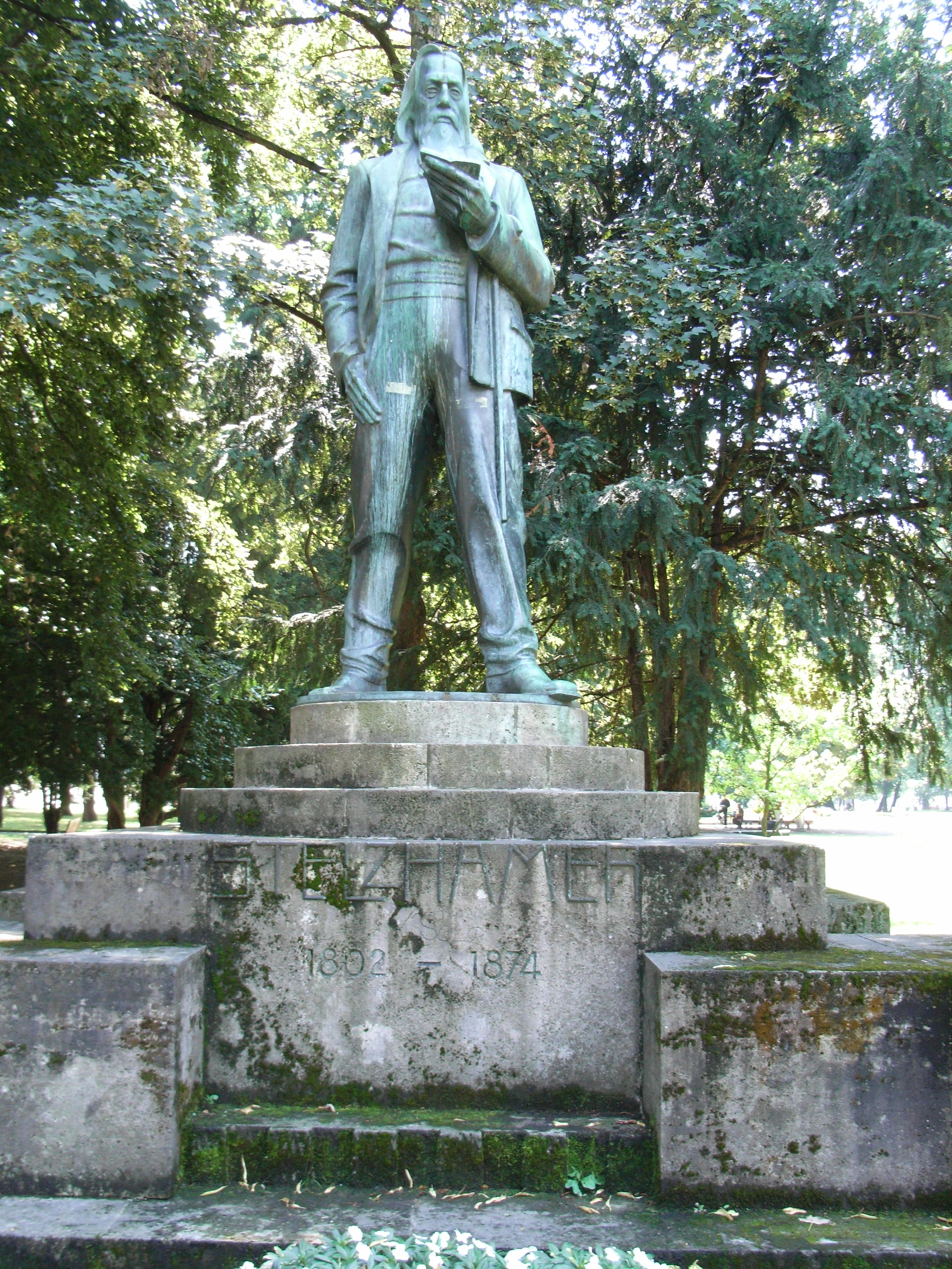 Franz Stelzhamer statue in Linz, by Franz Metzner